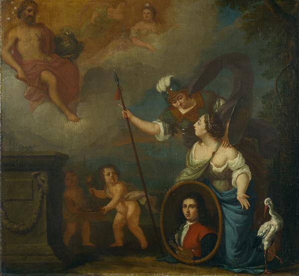 Self-portrait Juriaan Pool